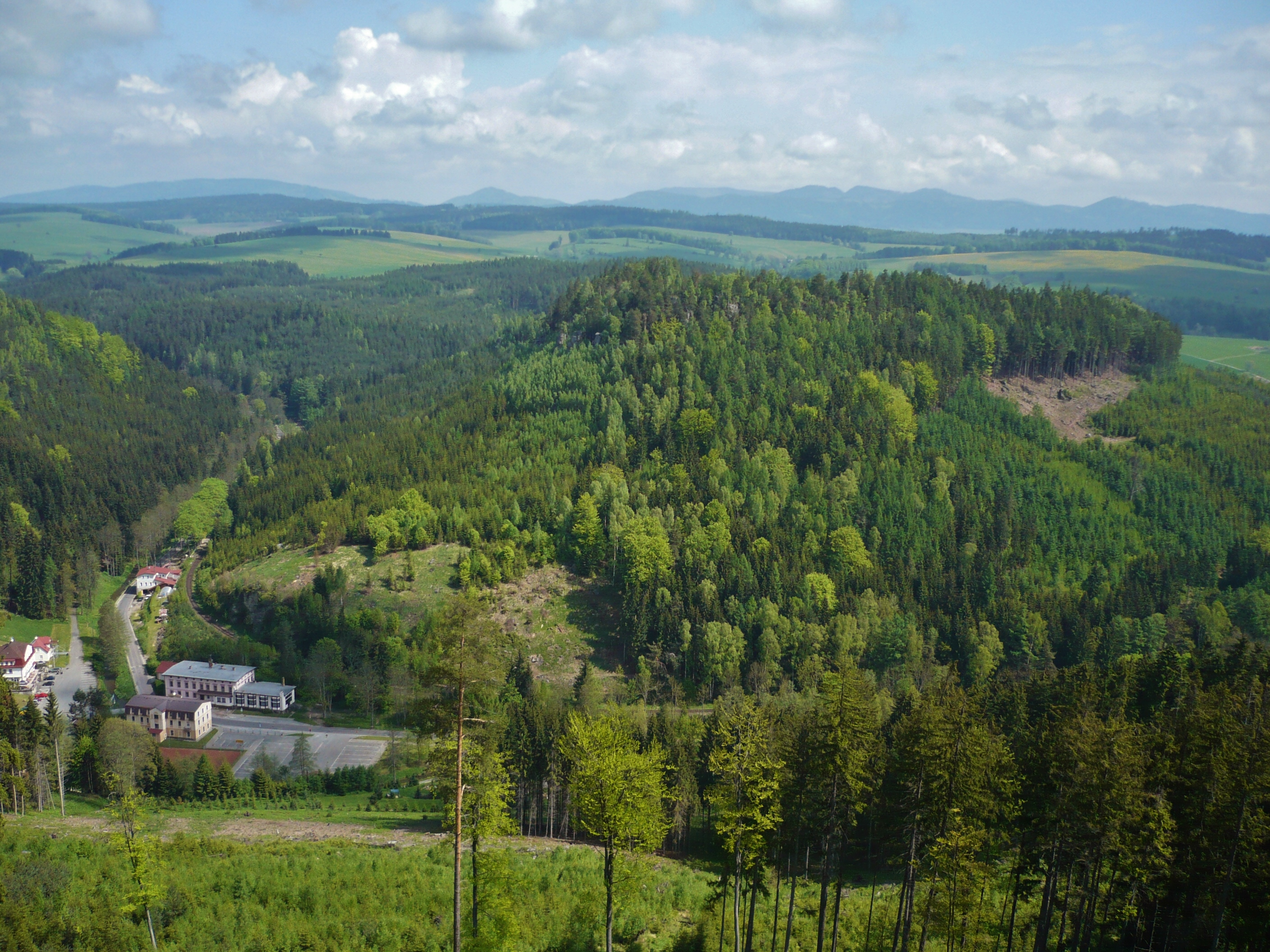 Pohled na PP Borek od jihu